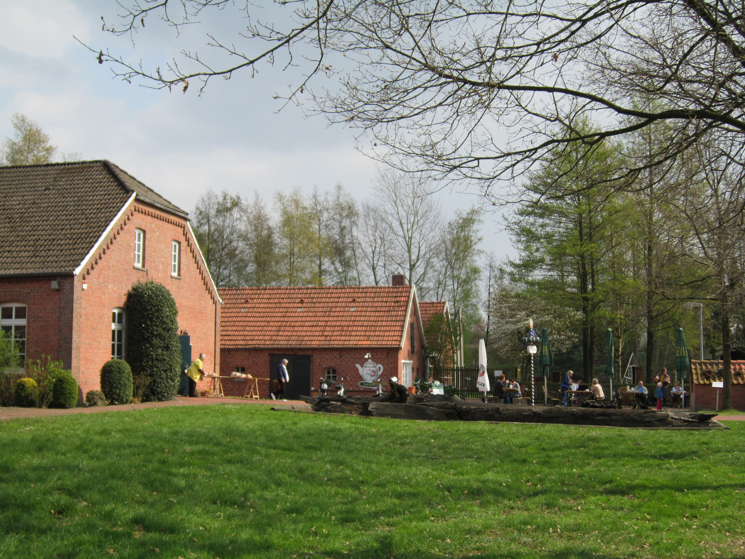 Eingangsbereich des Moor- und Fehnmuseums Elisabethfehn